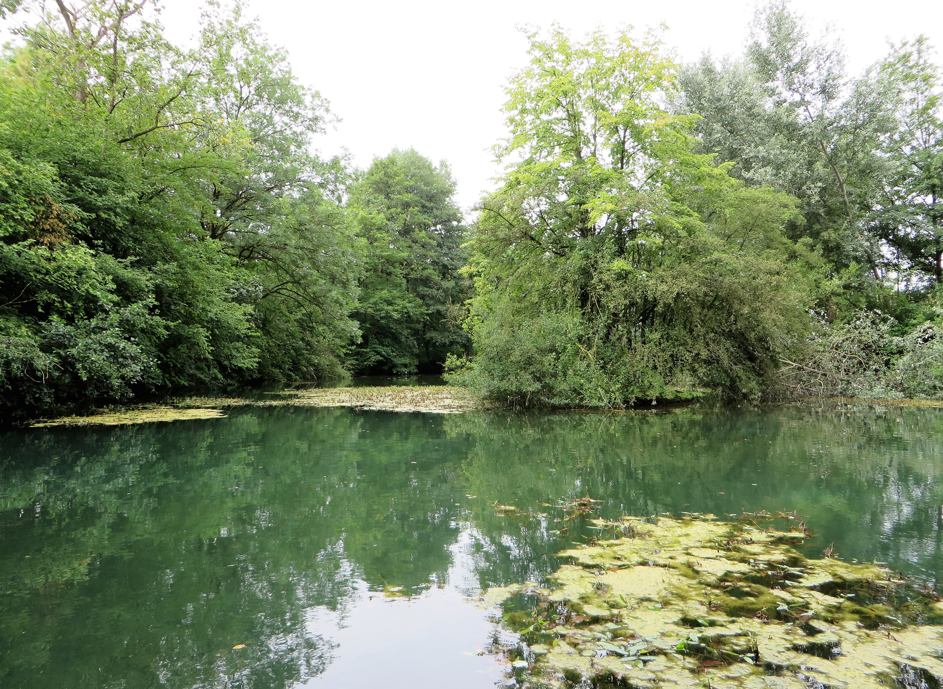 Geschützter Landschaftsbestandteil 1.4.2.31 „Ölmühlenteich“ in Hagen-Herbeck, Sudfeldstraße. Es handelt sich um einen Teich nördlich von Herbeck mit artenreichen Röhrichtzonen sowie um einen gehölzbestandenen Umflutgraben des Ölmühlenbaches. Südlich angrenzend liegt das Landschaftsschutzgebiet „Herbeck“.